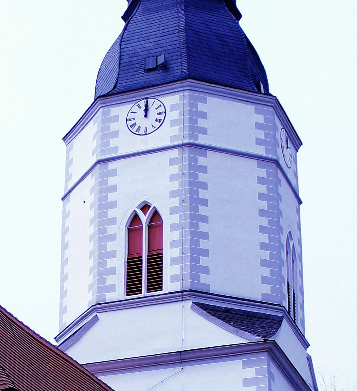 Großthiemig Dorfkirche mit Kriegerdenkmal.